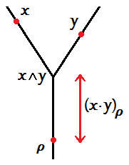 propriété Y d'un arbre reel